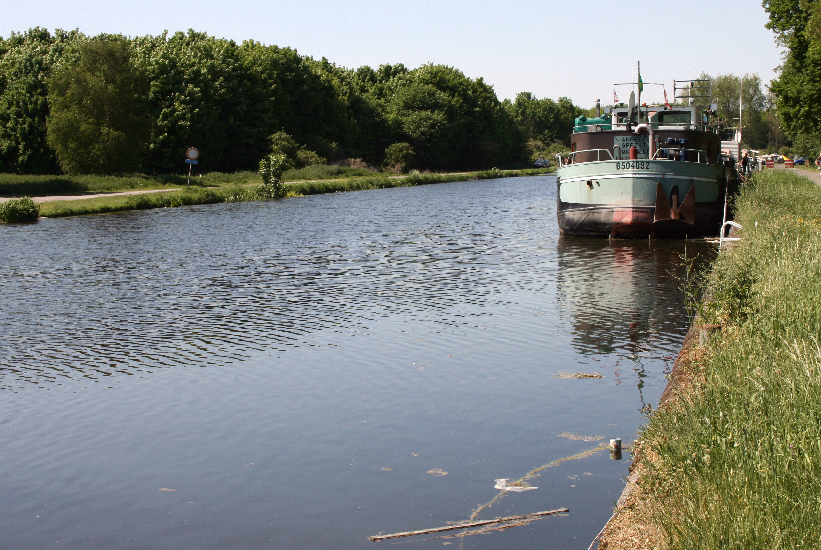 Kanaal Leuven-Dijle between Mechelen en Zennegat (Belgium)